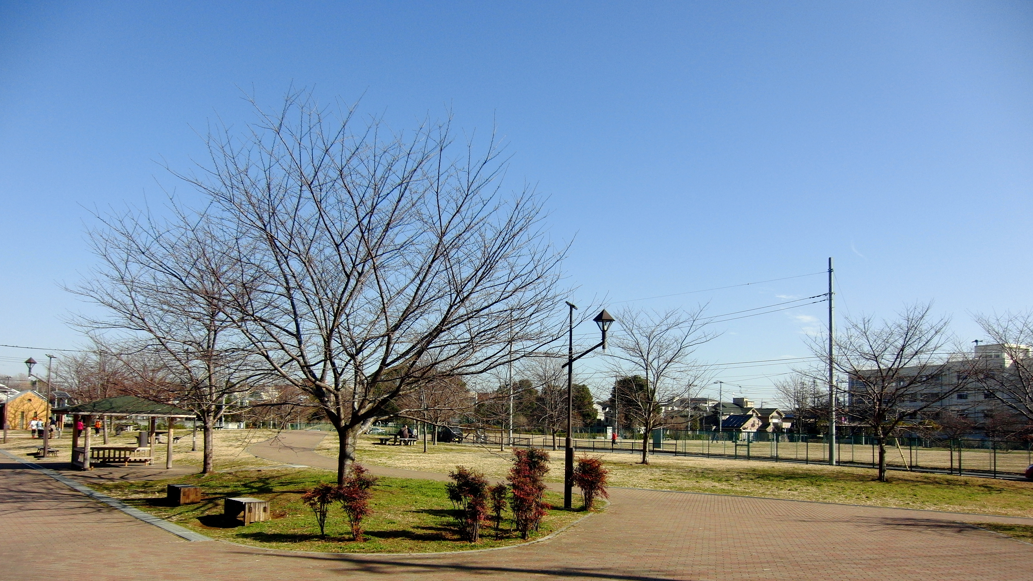 城北中央公園のクローバー広場（東京都練馬区羽沢三丁目）